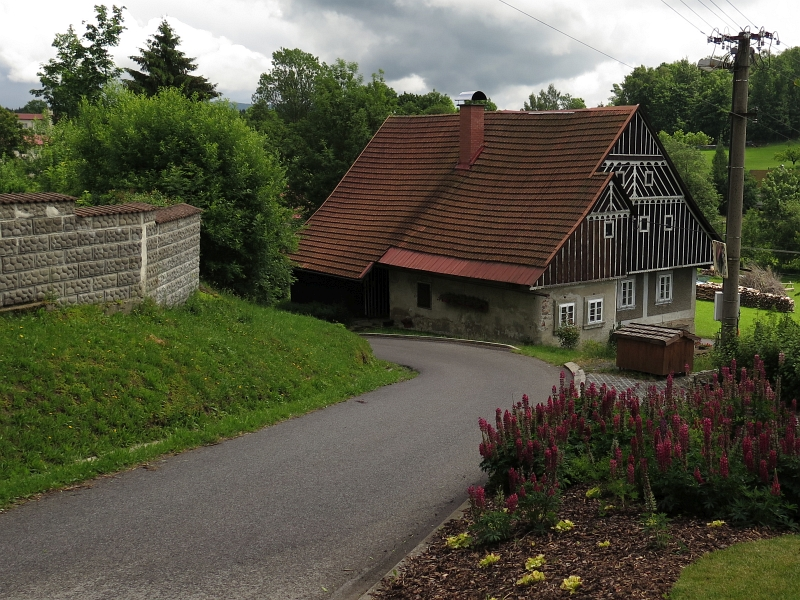 Usedlost čp. 210, Roprachtice 210, Roprachtice.